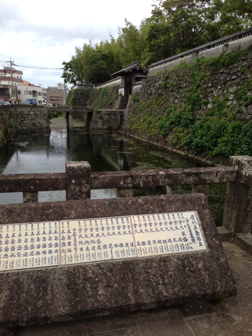 長崎県五島市-石田城